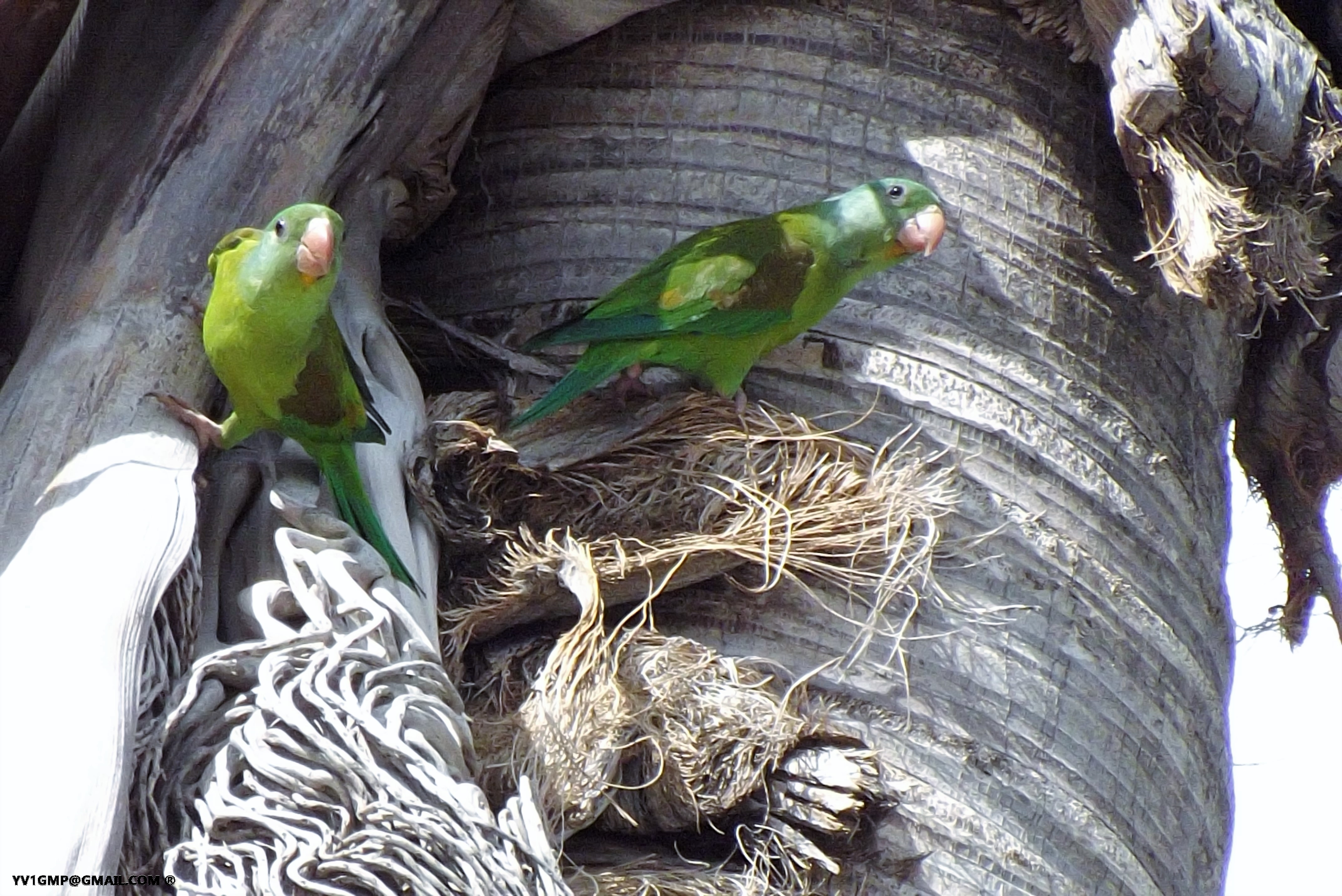 Pareja de periquitos ala marrón alimentándose de drupas secas de un Chaguaramo (Roystonea oleracea)